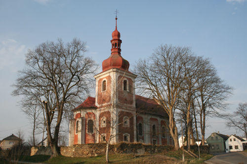 Kostel svatého Prokopa z roku 1365 v Úněšově, okres Plzeň-sever, Česká republika. Původně gotický kostel, který byl později barokně přestavěn. Kolem kostela býval hřbitov, který byl v 70. letech 20. století zrušen.